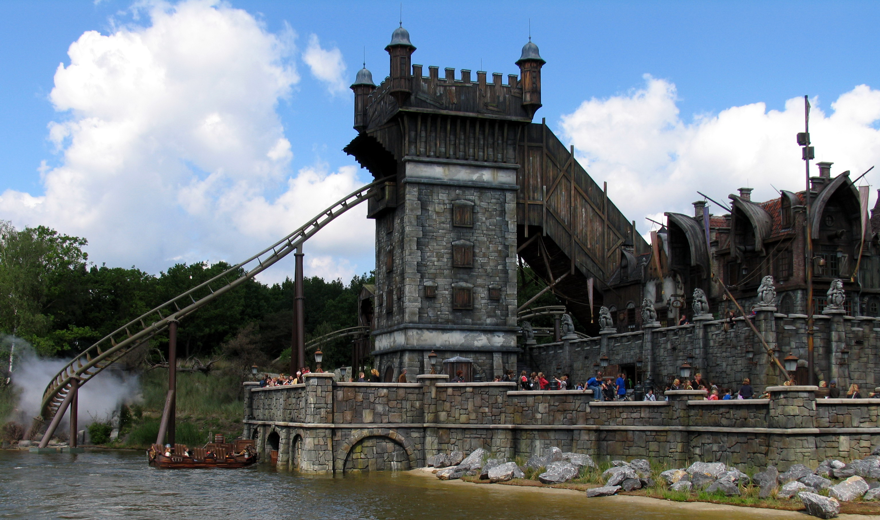 De Vliegande Hollander in Efteling